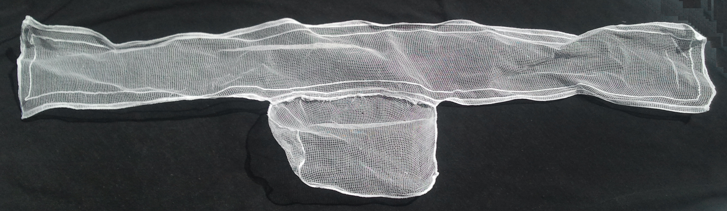 Coiffe du début du 20 ieme siècle portée par les femmes du hameau (lieudit) les tenus à la grée saint Laurent 56120, Bretagne France